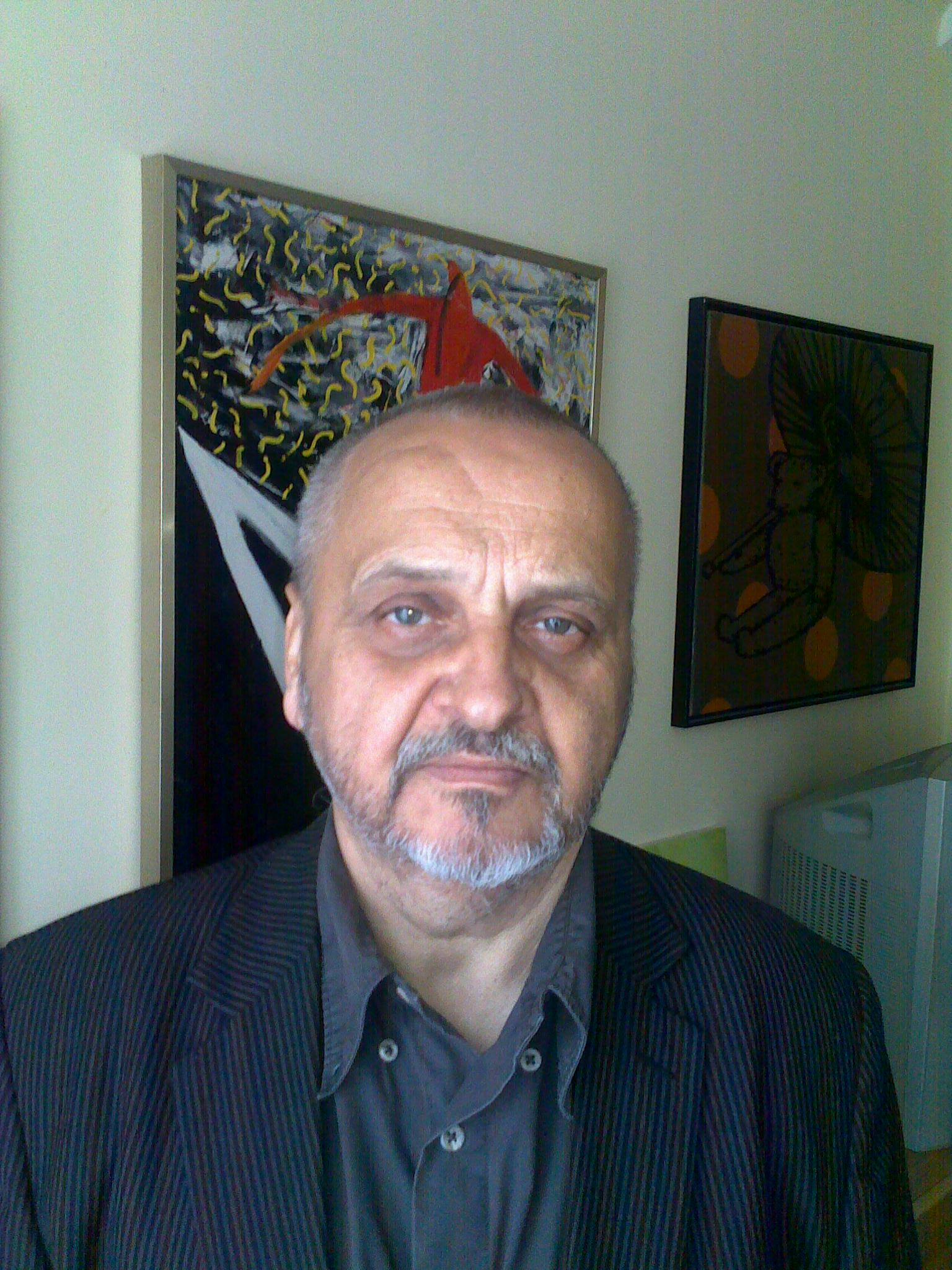 Český spisovatel Jiří Olič.